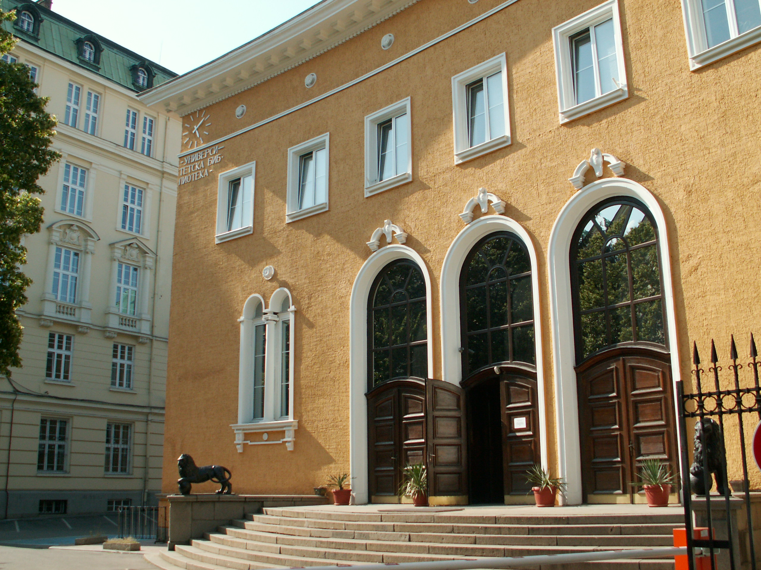 Entrée principale de la bibliothèque de l'université de Sofia